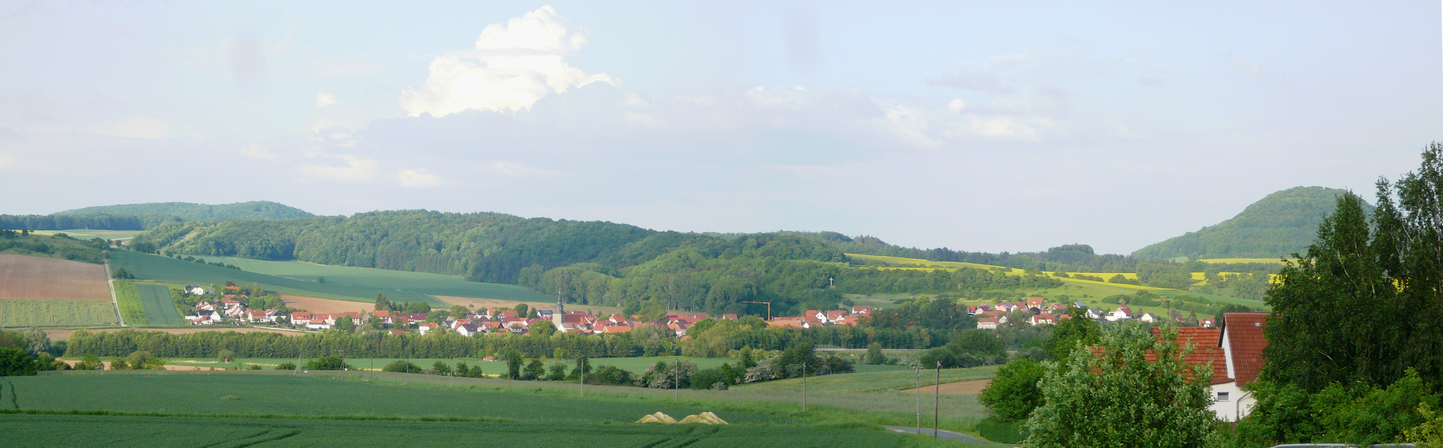 Blick von WSW vom Hang der Schmiedeköpfe (nahe der Bahnstrecke zwischen Arenshausen und Eichenberg) auf Kirchgandern (rechts die Häuser gehören zu Hottenrode, im Hintergrund der Rusteberg (re) und der Rohrberg (li))